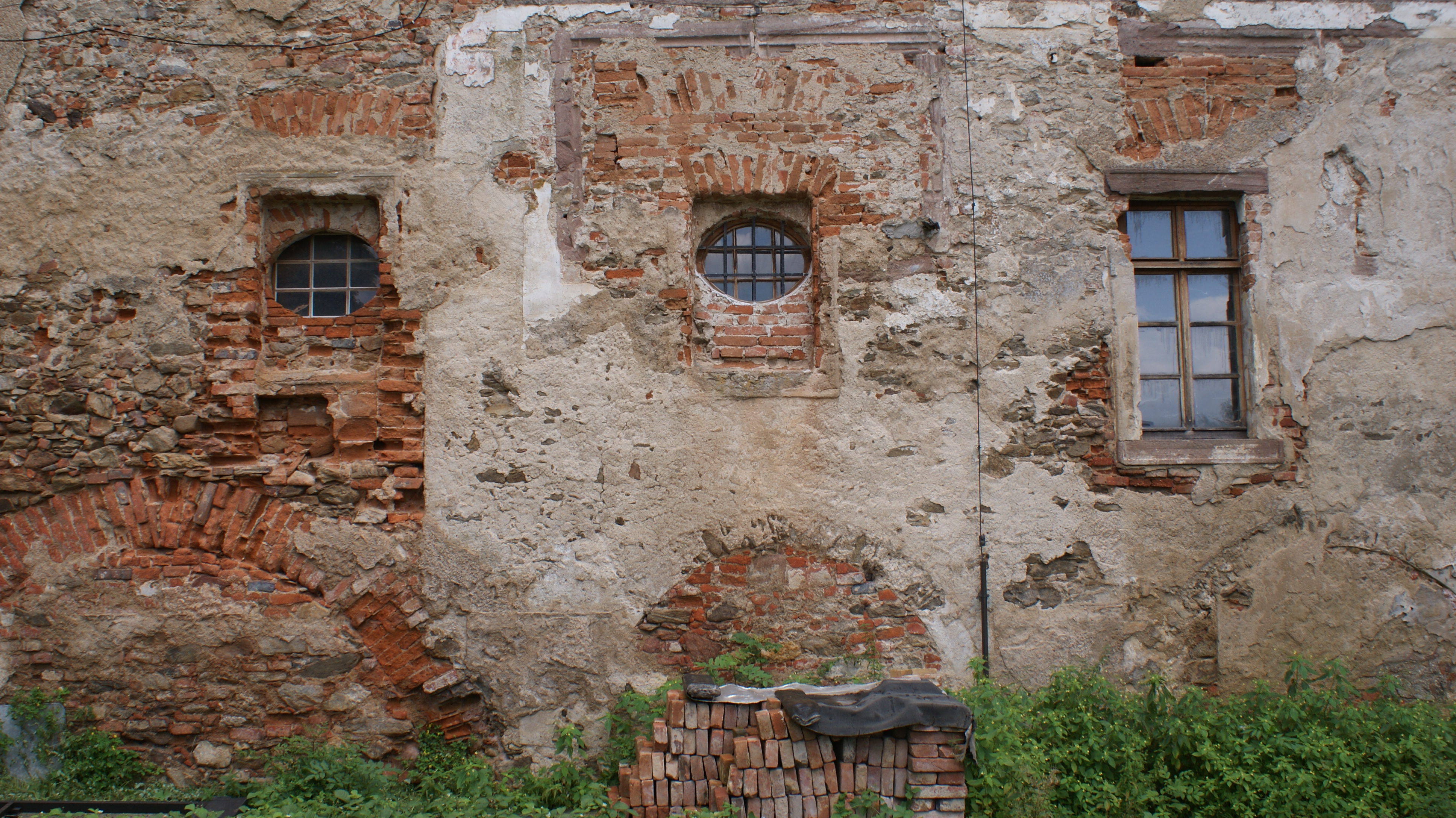 Detail zdiva západního křídla Vodní tvrze Popovice (okres Benešov) Pohled na obnažené zdivo a okna přízemí západního křídla na severní části u vstupního portálu. Obnažené zdivo dokumentuje vývoj od gotické tvrze k baroknímu zámečku. "V rozsahu vyvýšeného přízemí je na podstatné části fasády dobře patrná pozdně gotická (goticko renesanční) úprava s masivními pasy slepé, později zazděné arkády vynášející zdivo a nad ní osazená převážně sdružená okna s kamenným ostěním s pozdně gotickou profilací s přetínanými pruty. Okna rámovaly z části dochované pasparty z utažené bíle natřené omítky, které nad nadpražím propojoval plynule běžící pás, podtrhující kamennou, později osekanou pozdně gotickou římsu. Dochovaly se dílčí plochy hrubě rovnané pozdně gotické omítky. Výrazným architektonickým prvkem je dobře dochovaný pozdně gotický vjezdový portál brány. Ustupující úseky pozdně gotického zdiva při vstupním rizalitu a jihozápadním nároží byly obezděny respektive dozděny v barokním období, kdy bylo postaveno patro a fasáda dostala výraznou barokní úpravu. V přízemí nahradila pozdně gotické okenní otvory okna barokní s kamennými nadpražími a parapety, u schodiště částečně řešená jako slepá s vloženými oválnými otvory. Patro má vysoká okna se šambránami s volutovýma ušima a s výraznými suprafenestrami se stlačeně vzepjatými římsami. Mezi nimi jsou viditelné fragmenty plochých nik, které lze interpretovat jako zbytky panelovaných štítů. Zbytky pozdně gotických, později opravovaných omítek a omítek i barokních s lizénami překrývala částečně dochovaná novobarokní fasáda s hladkými, v koutech „voutami“ vyplněnými lizénovými rámy a plochami pokrytými hrubou omítkou. S úpravou souvisí i nadezdívka, která nahradila odstraněnou barokní římsu. Upravena byla barokní okna přízemí." (podle M. Rykl).